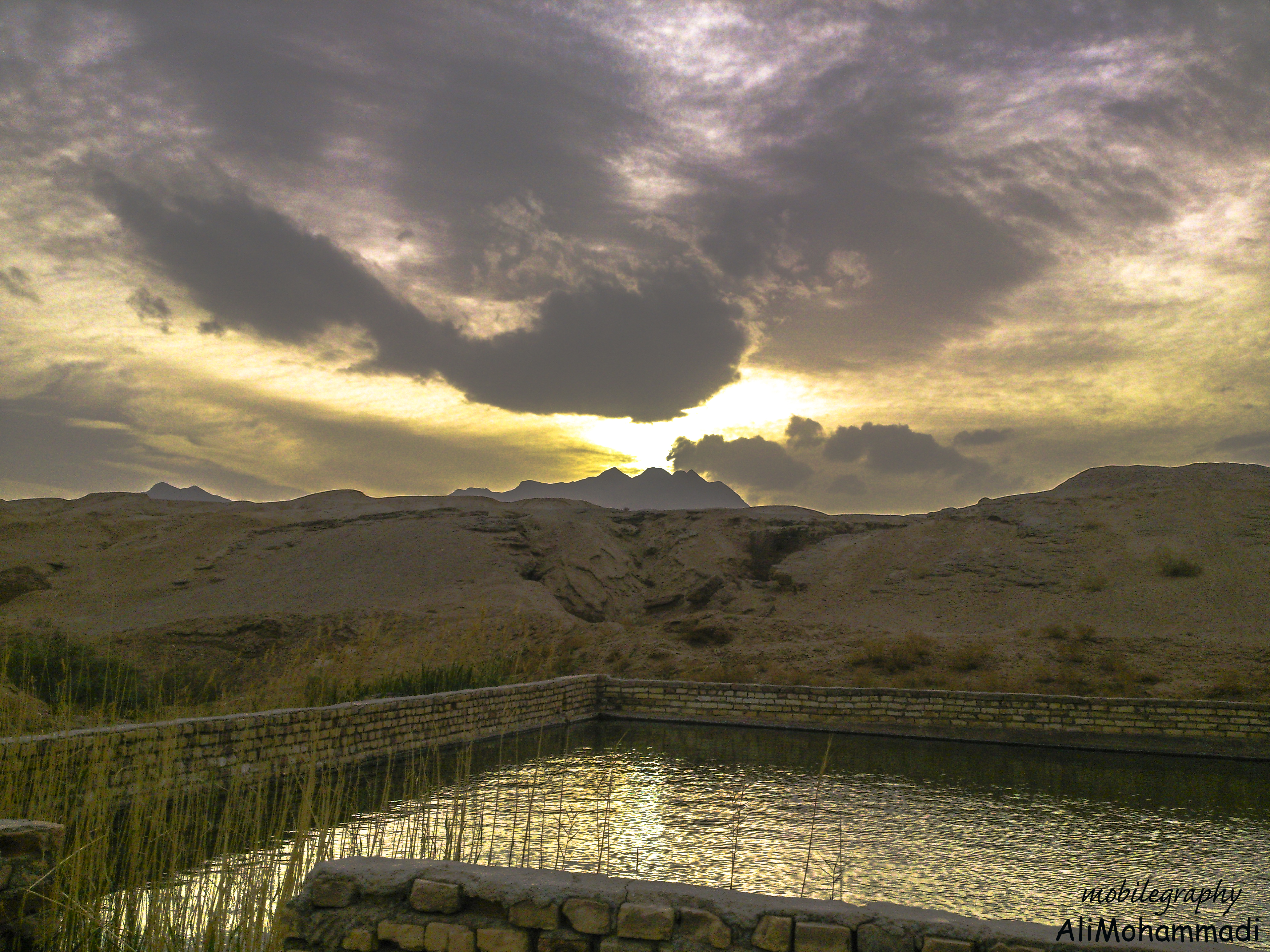 غروب افتاب در مزرعه ساغند